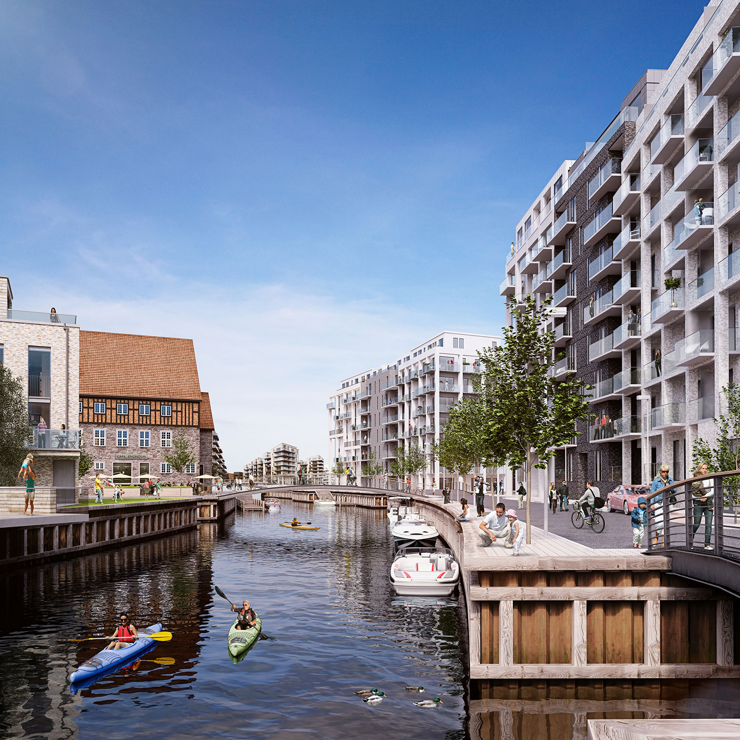 Engholmene - et kig op af den store kanal 'grande'